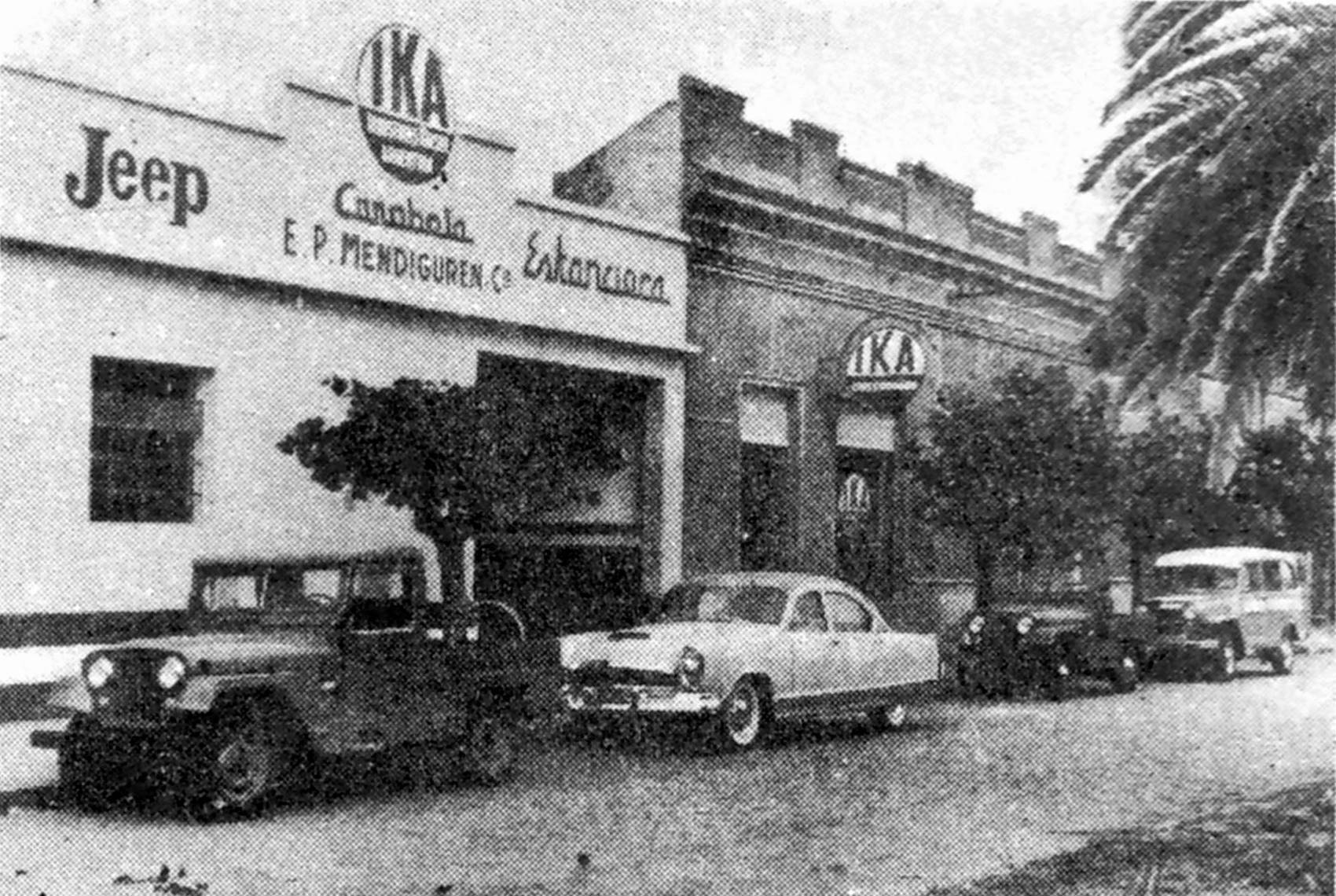 Local de IKA en la ciudad de Rauch, Buenos Aires